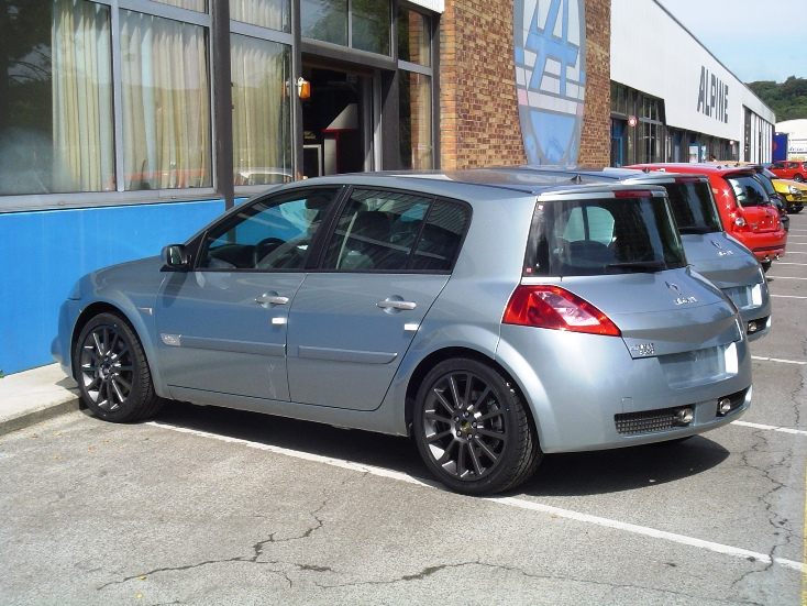 Mégane RS phase 1 Usine Alpine Dieppe (Auteur arrrrdaste)